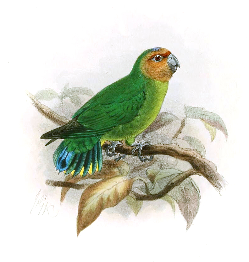 Nasiterna pusio = Micropsitta pusio